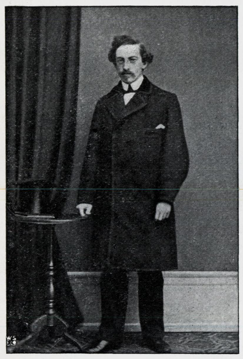 Illustrasjon hentet fra boken "En Christianiensers Erindringer fra 1850- og 60-Aarene" av Nielsen, Yngvar og utgitt av Gyldendal (Kristiania, 1910) Henrik Jørgen Huitfeldt-Kaas (1834-1905) i 1862.